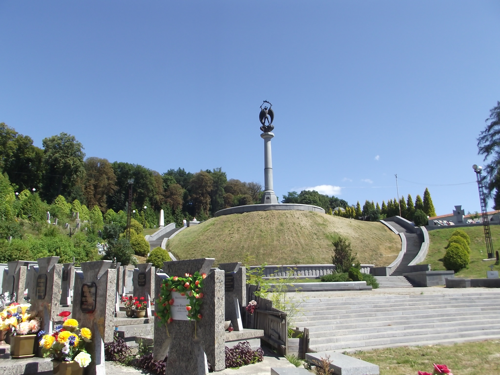 Меморіал_воїнів_УГА.JPG, Львів, Личаківське кладовище, поле 76